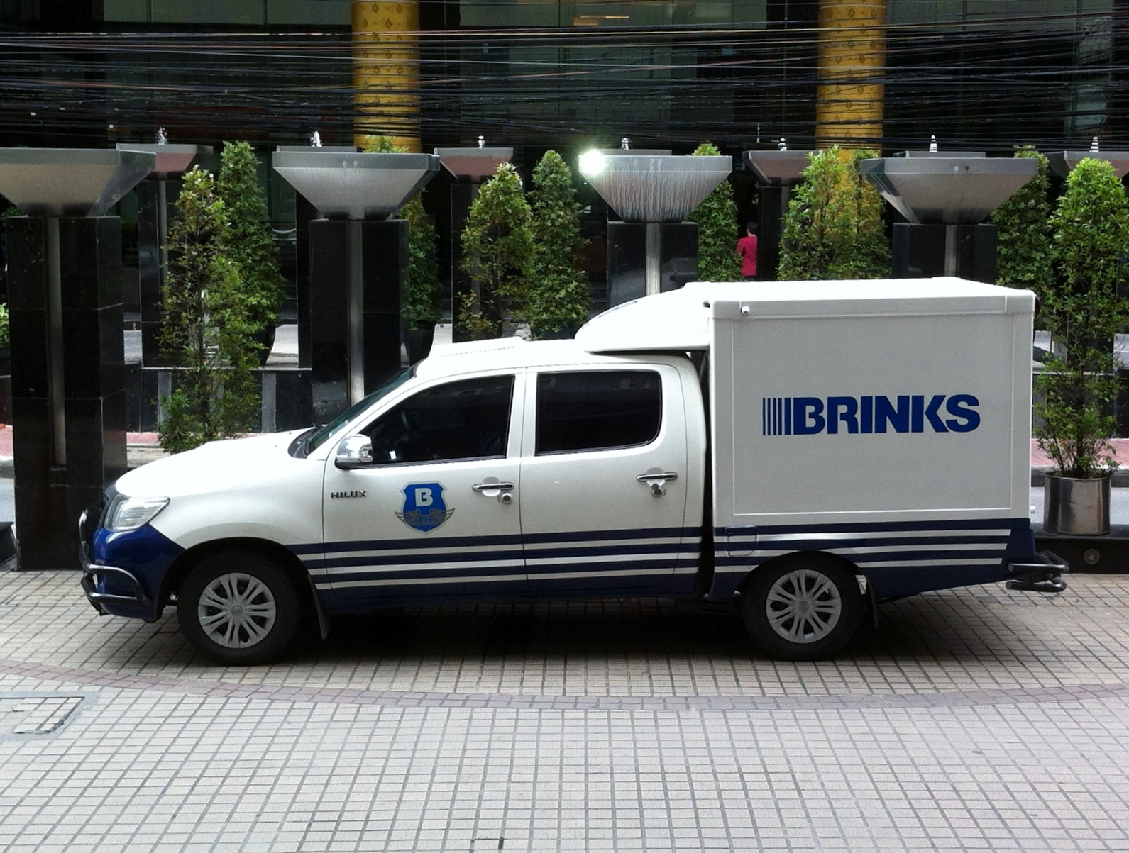 Véhicule Toyota Hilux de la Brink's à Bangkok en 2013.